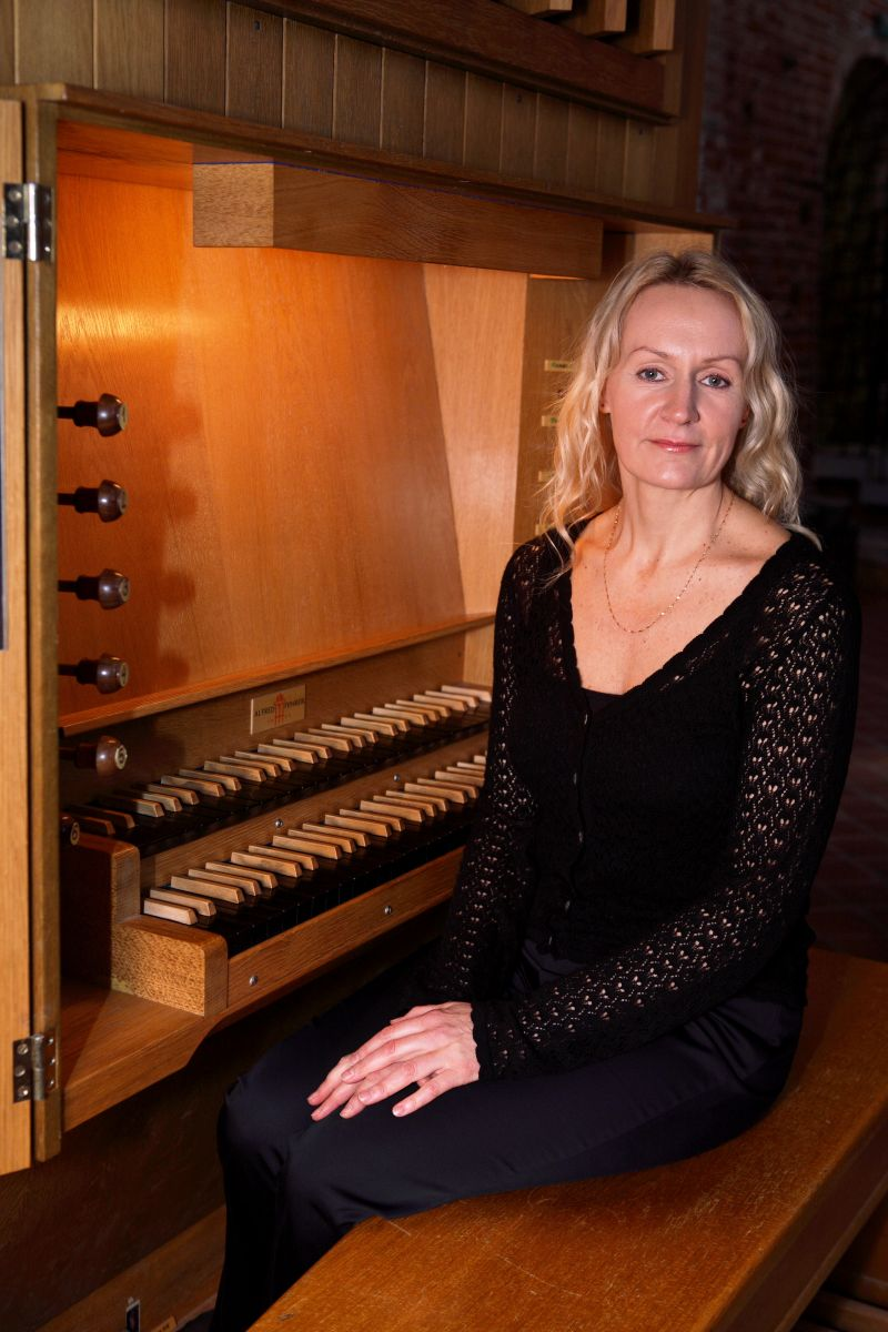 Kontsert Tartu Jaani kirikus